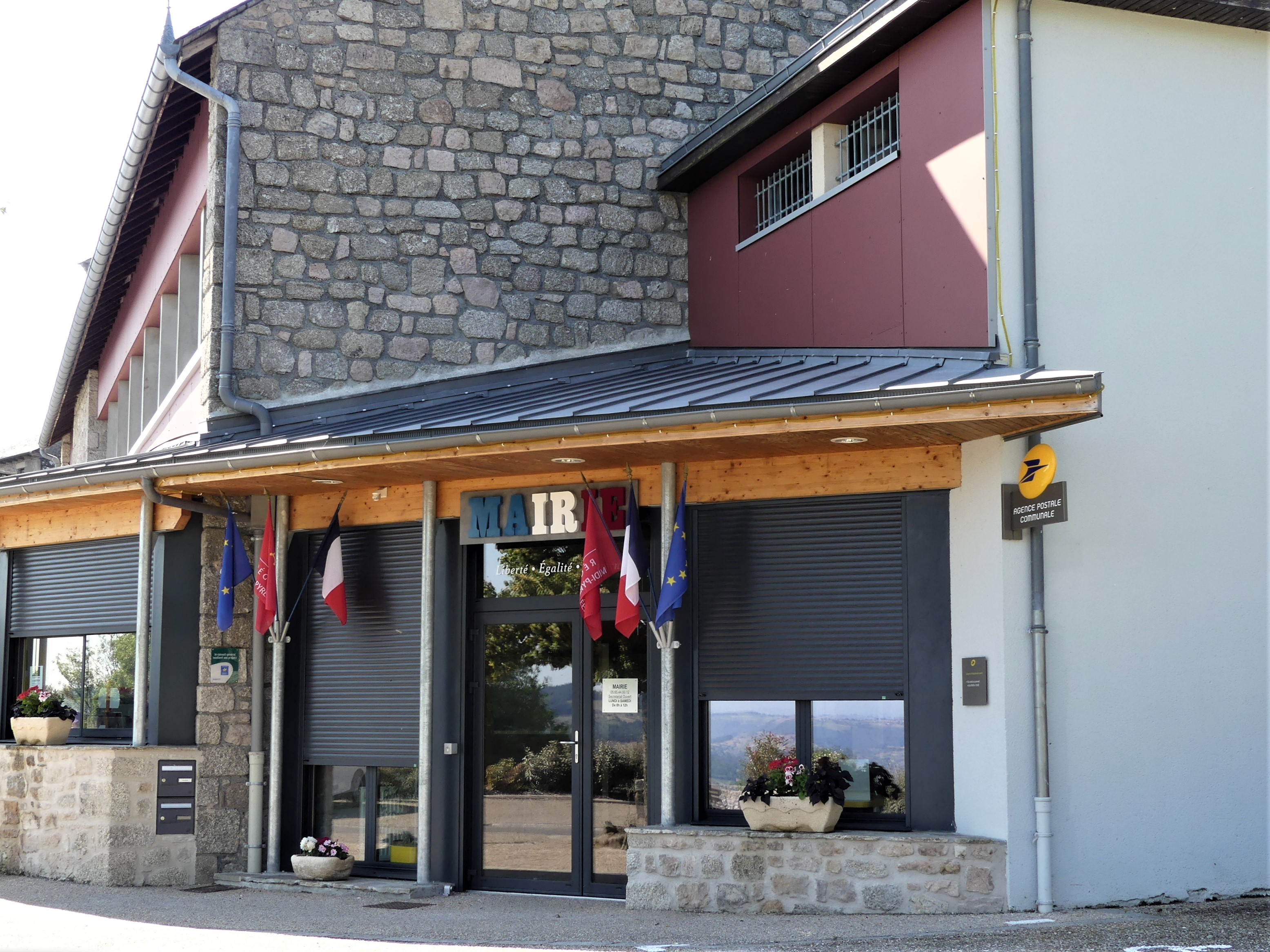 La mairie de Golinhac, Aveyron, France.